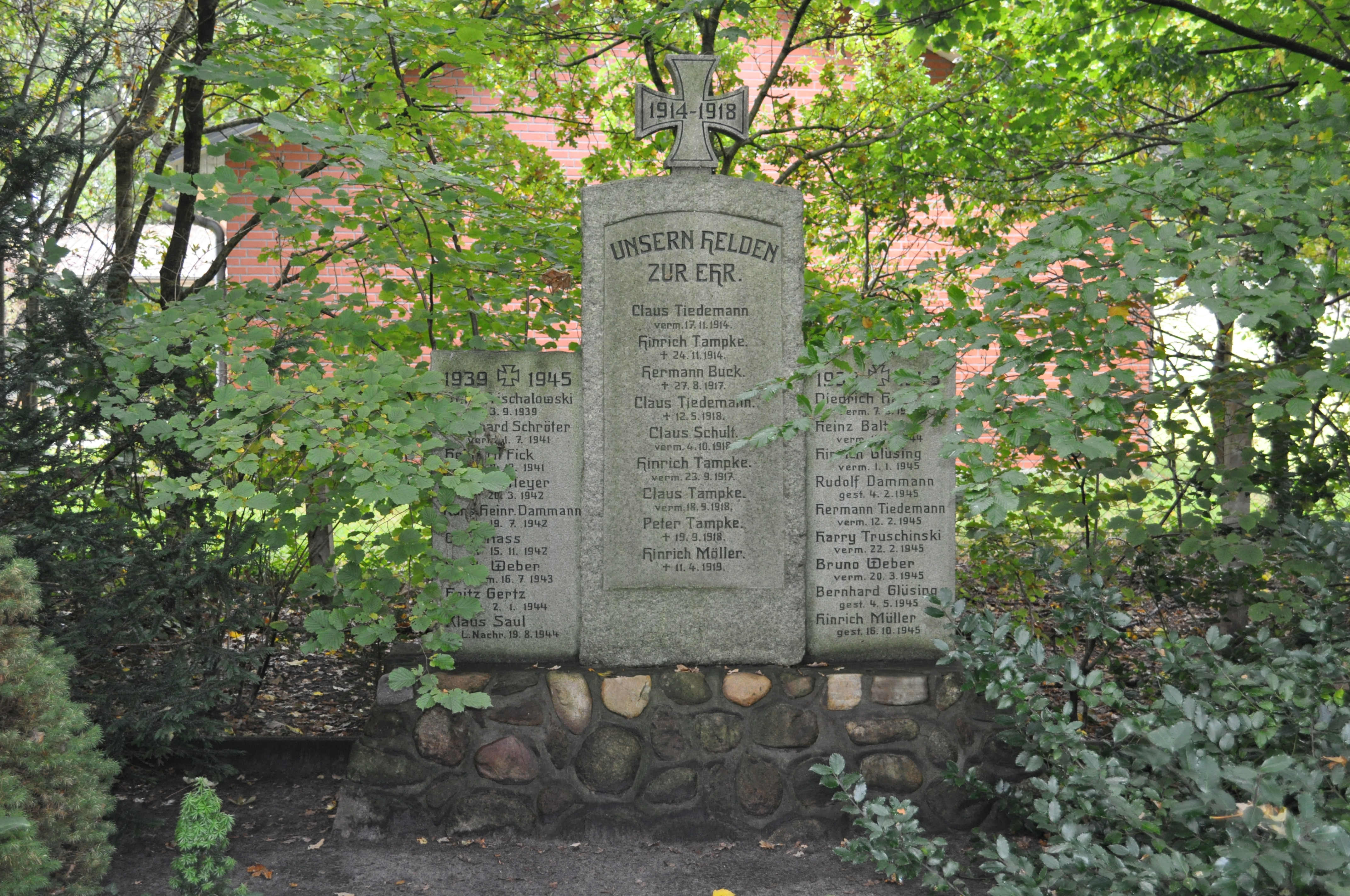 Kriegerdenkmal auf dem Friedhof Heeßel (Hemmoor). This is a photograph of an architectural monument. .202.200.012